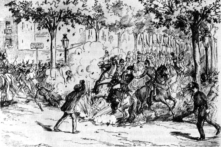 Imagem de jornal do atentado do anarquista Paulino Pallás contra a vida do comandante geral Arsenio Martinez Campos durante uma parada militar em 24 de Setembro de 1893